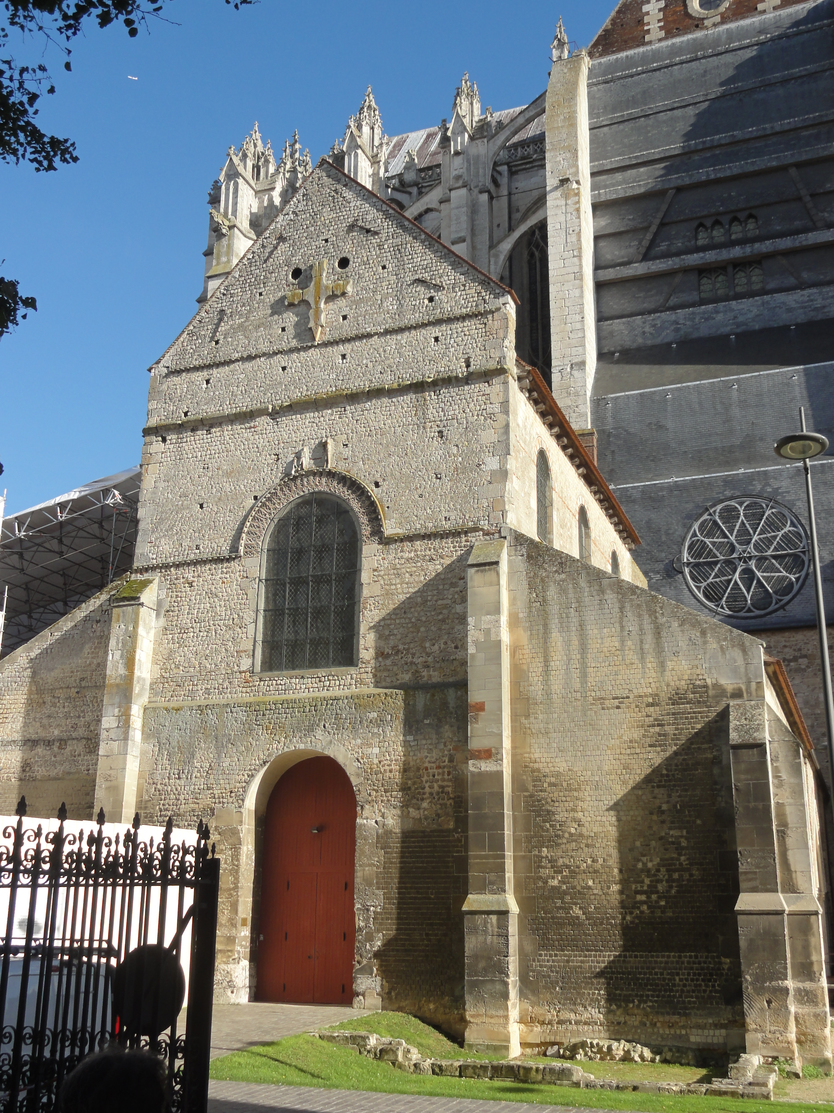 Façade occidentale.